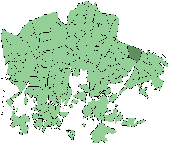 Districts of Helsinki, Mellunkylä district highlighted (in Finnish: Mellunkylä peruspiiri korostettuna)